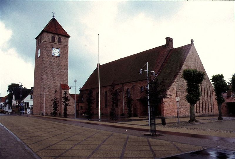 Brønderslev ny Kirke i Danmark. Brønderslev ny kirke